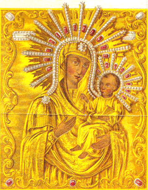 Багародзіца Адзігітрыя Каложская